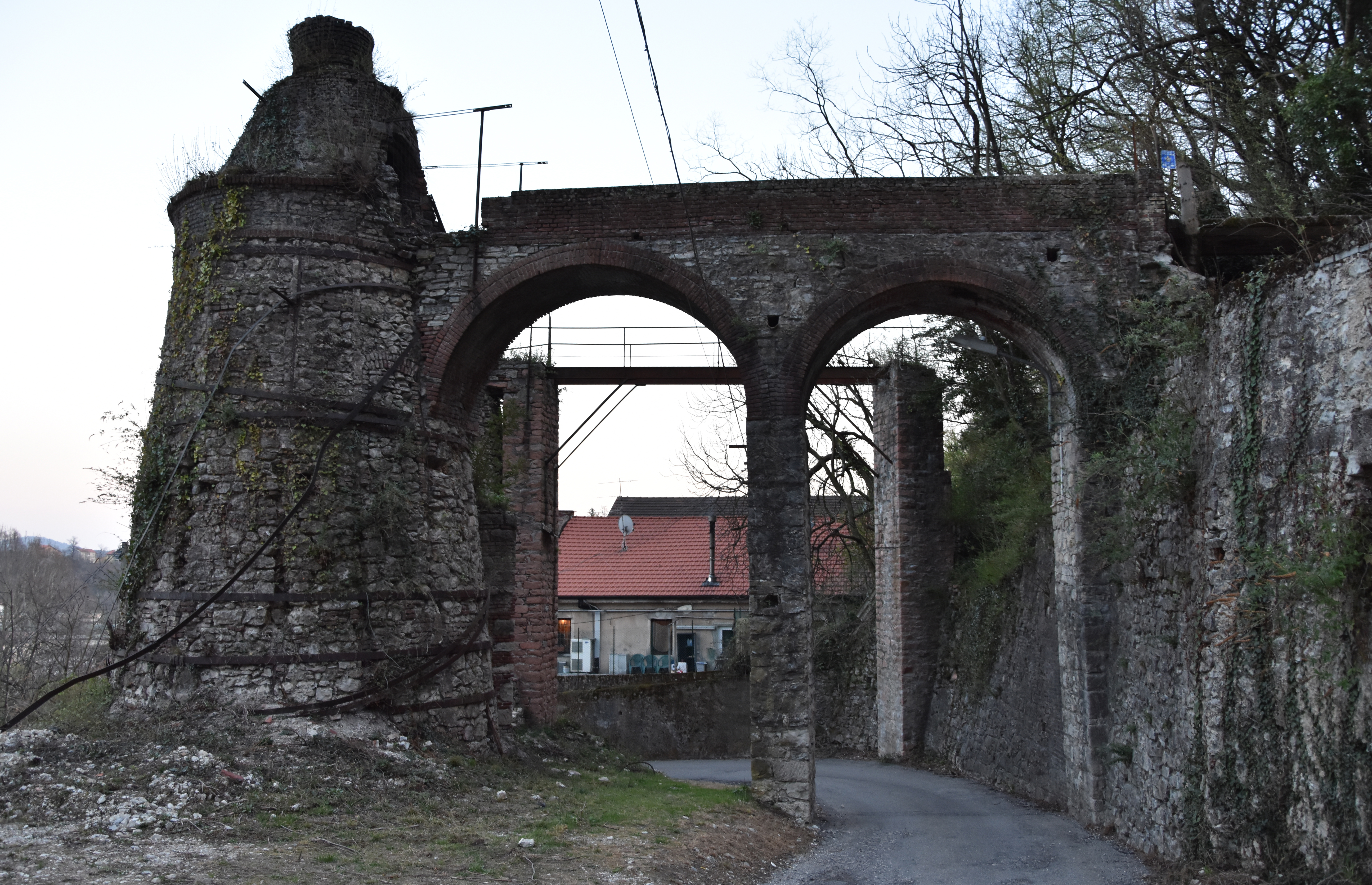 Le vecchie fornaci di Arcisate.